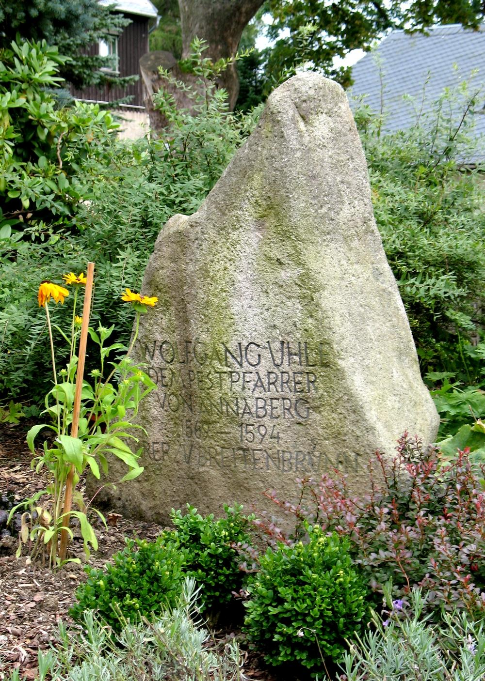 Gedenkstein zu Ehren Wolfgang Uhles vor der Kirche zu Breitenbrunn: WOLFGANG UHLE / DEM PESTPFARRER / VON ANNABERG / 1569 - 1594 / PFARRER ZU BREITENBRUNN